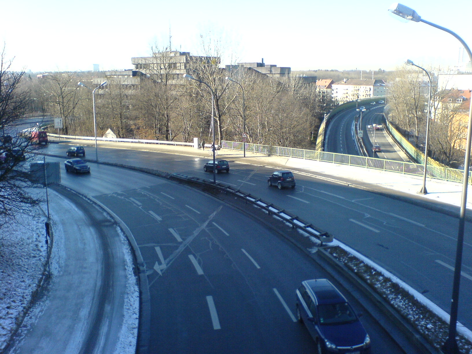 München, Candidstraße (westlich)